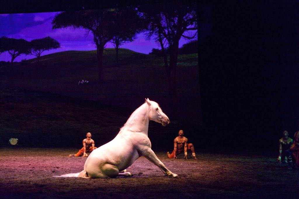 Spectacle Odysséo de Cavalia, Laval, Québec, Canada.